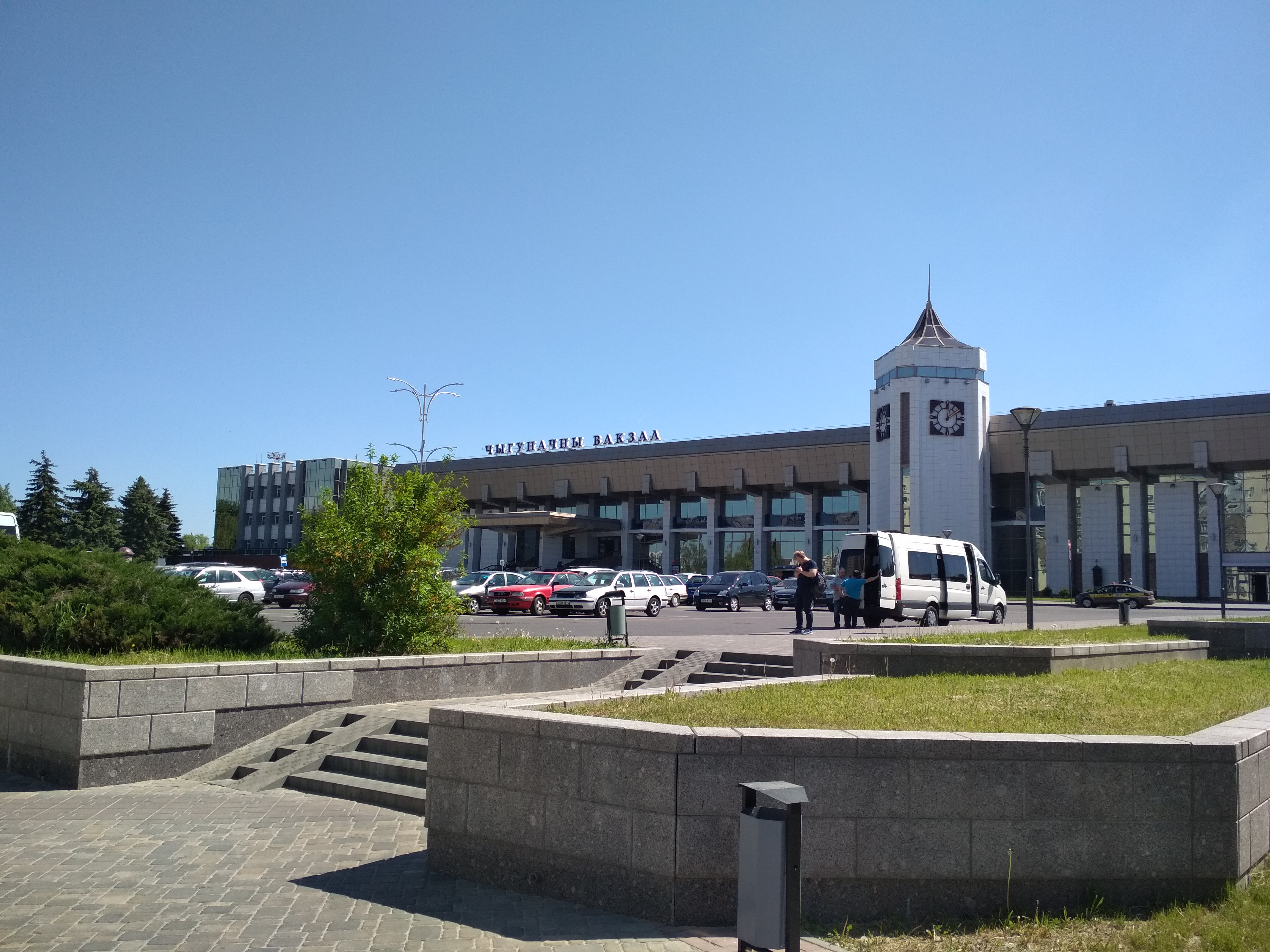 Гродна (2018). Прывакзальная плошча